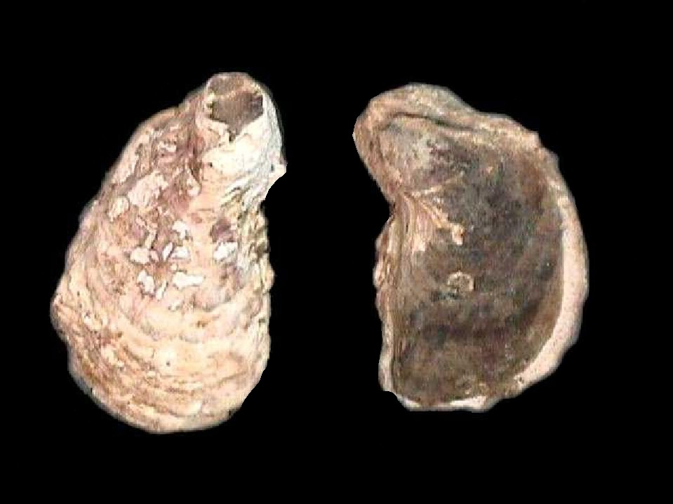 Crassostrea rhizophorae del Golfo de Cariaco, estado Sucre